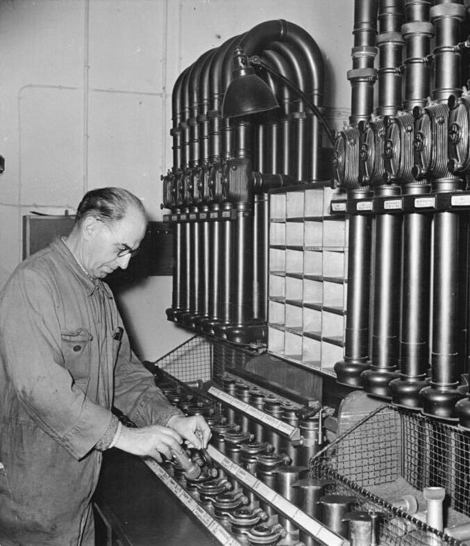 Zentralbild Mihatsch 23.1.1959 50 Jahre Postscheckamt Berlin- Das Postscheckamt Berlin, das größte und modernste der DDR, feiert in diesen Tagen sein 50-jähriges Bestehen. Hunderte von Angestellten bearbeiten 50.000 Postscheckkonten von Bürgern aus allen Bezirken der DDR. Nachdem das in den Jahren 1921 bis 1925 errichtete Gebäude des Postscheckamtes Berlin im Kriege beschädigt und ein großer Teil des Inventars zerstört worden war, wird die Einrichtung seit 1945 ständig vervollkommnet. UBz: Die Hausrohrpost, die der schnellen Beförderung von Schecks und Biefsendungen dient. Rohrpostwärter Kurt Niemand bei der Bedienung der Anlage.